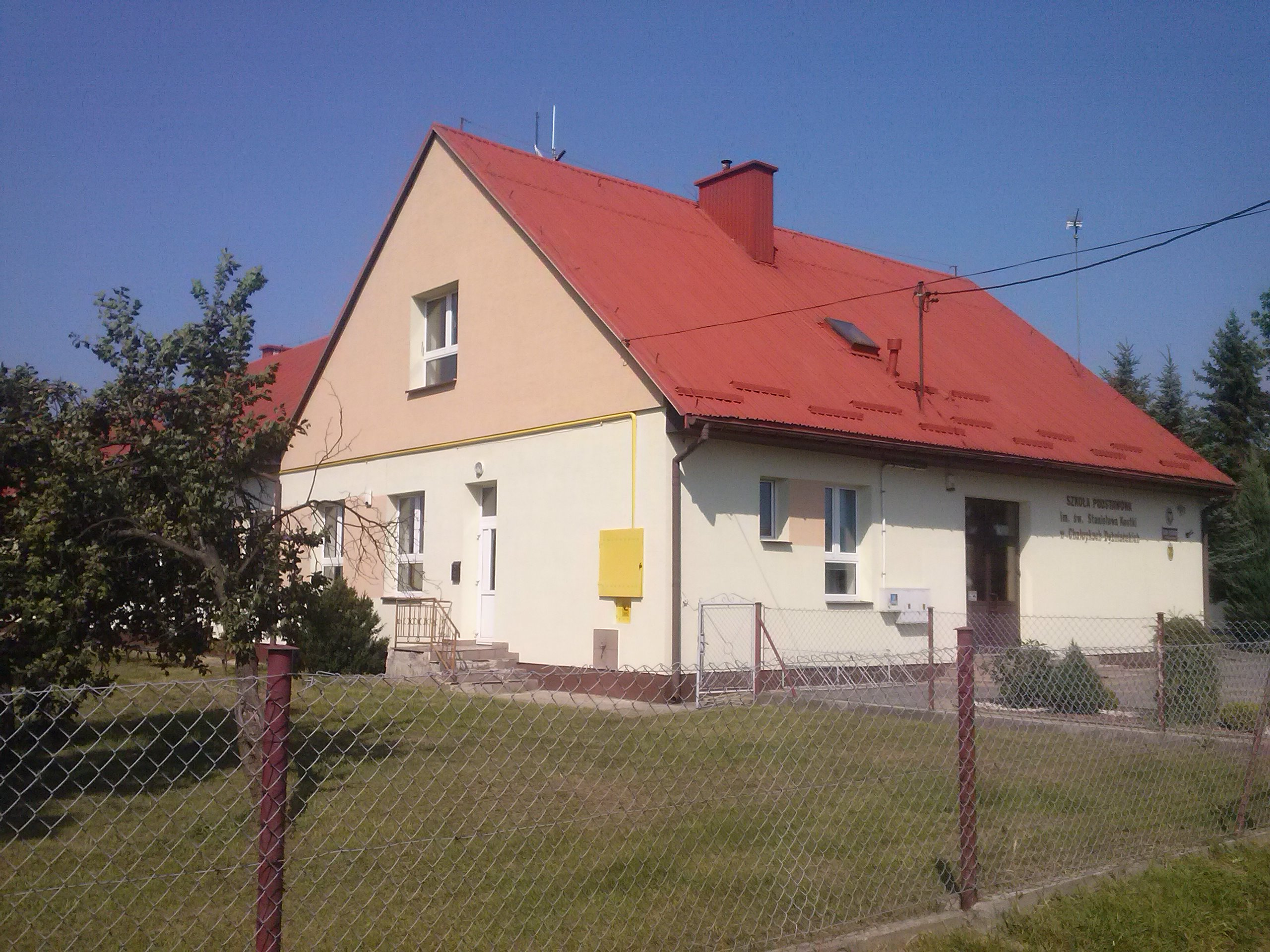 Szkoła podstawowa im. Stanisława Kostki w Chałupkach Dębniańskich (część najstarsza)